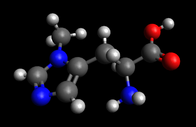 Representación de 3-metilhistidina